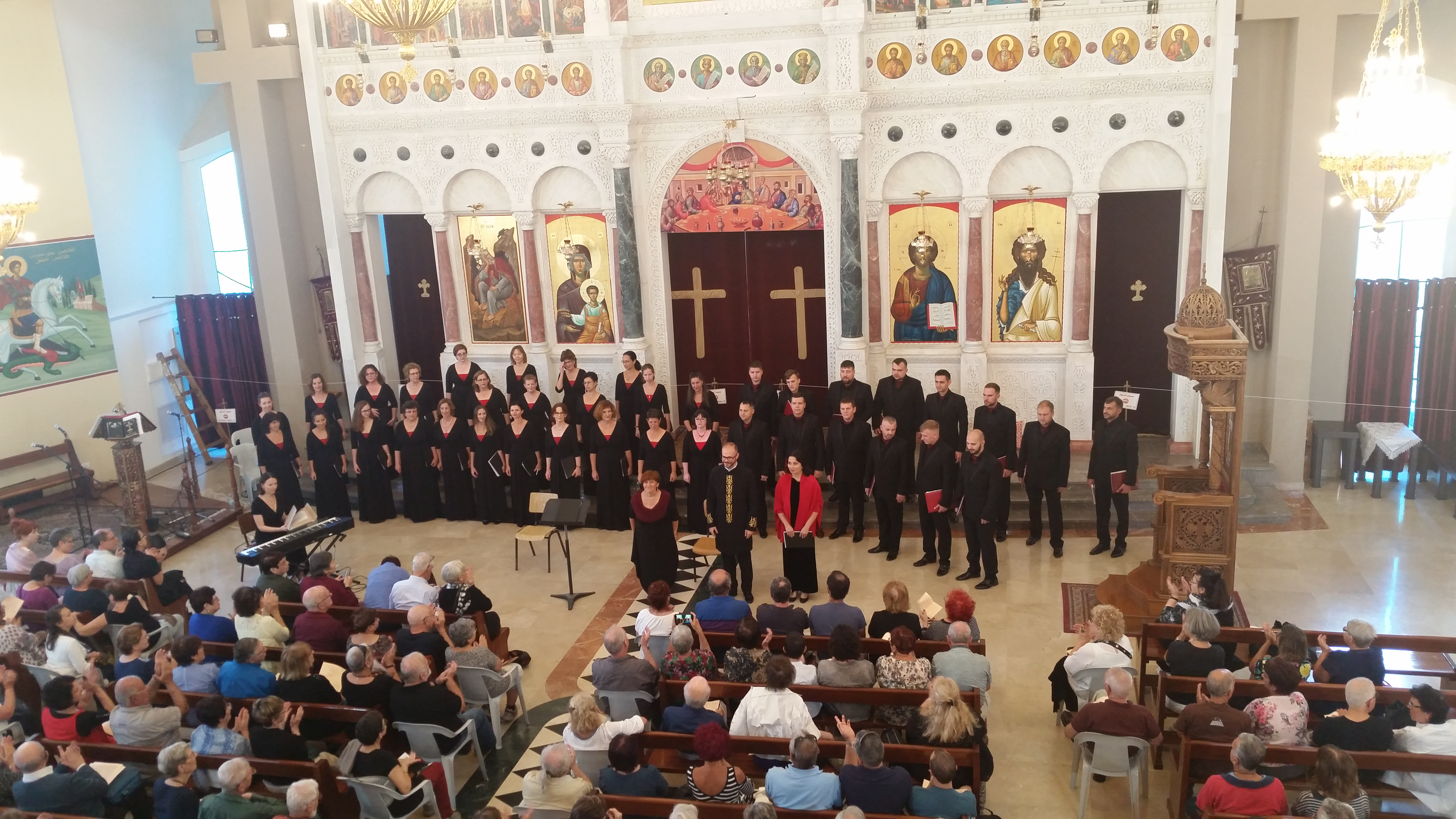 אנסמבל קולות הנשים נעמה מישראל ומקהלת הגברים הרוסית סימוול וורי בקונצרט משותף בכנסייה היוונית אורתודוקסית ברחוב הפרסים 3 בחיפה. הופעה בתוכנית זהה להופעה בפסטיבל אבו גוש שבה הופיעו ב-14 באוקטובר 2017